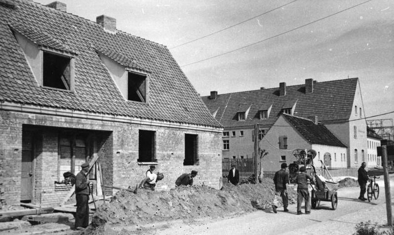 Dorfumsiedlung nach Kohlefund Illus/Merker Ein Dorf wird "versetzt", 26.8.49. Bei Tiefbohrungen in der Umgebung des Braunkohle-Tagebaues Nachterstedt in der sowjetisch besetzten Zone wurde ein außerordentlich reiches Kohleflöz direkt unter dem Dorf erschlossen. Um die neuen Kohlevorkommen der Wirtschaft nutzbar machen zu können, mußte mit dem Abbau des ganzen Dorfes begonnen werden, das an anderer Stelle weiter östlich moderner und schöner wiederaufgebaut werden wird. Auch das Altwerk muß weiter westlich versetzt werden. Die Kohlegruben von Neu-Nachterstedt werden eine weitere wichtige Stütze der Wirtschaft der sowjetisch besetzten Zone sein. U.B.z. Nach modernen Gesichtspunkten entsteht die Siedlung Neu-Nachterstedt. 2781-49